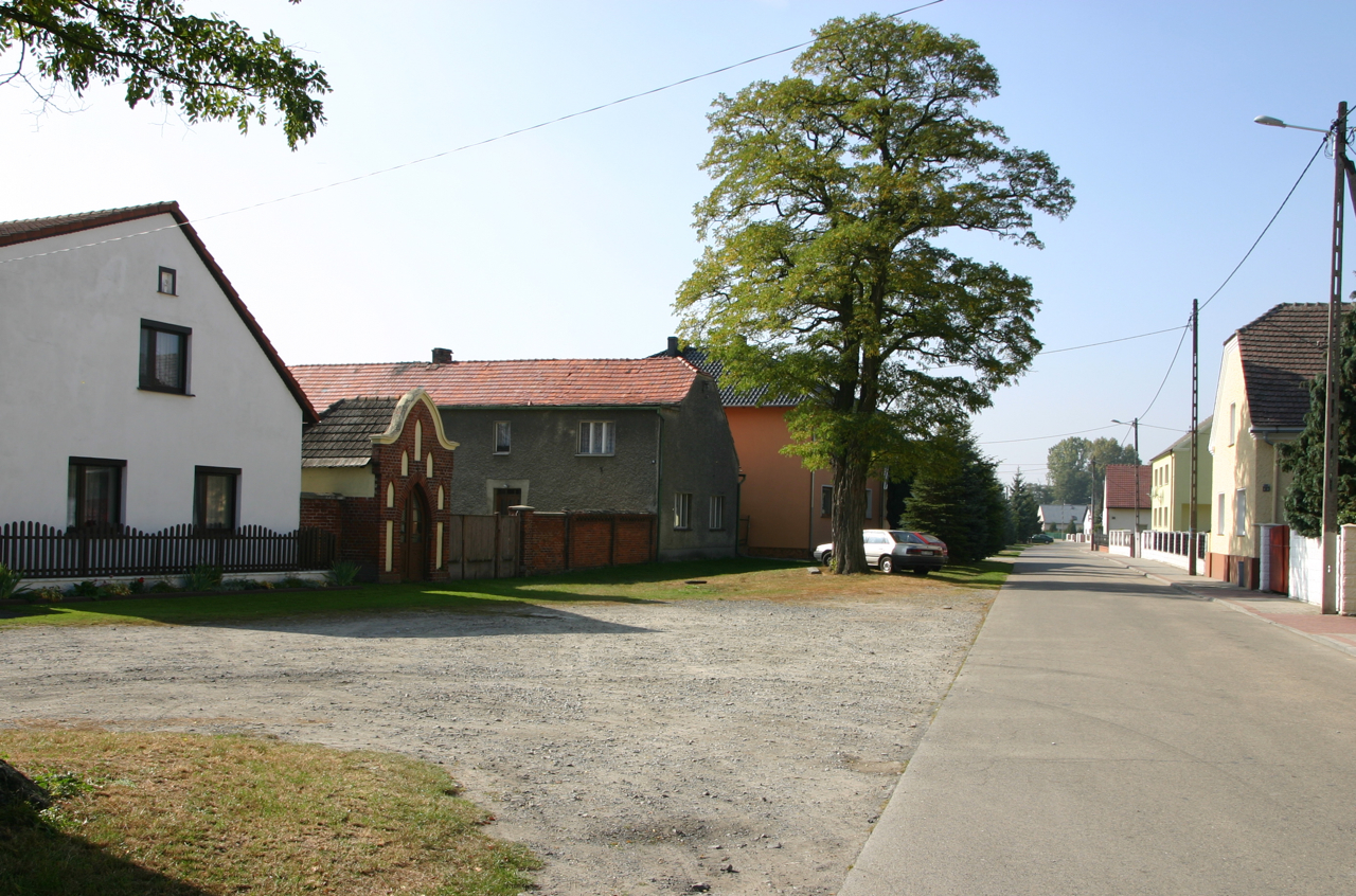 Mechnica (dodatkowa nazwa w j. niem. Mechnitz) – wieś w Polsce położona w województwie opolskim, w powiecie kędzierzyńsko-kozielskim, w gminie Reńska Wieś.